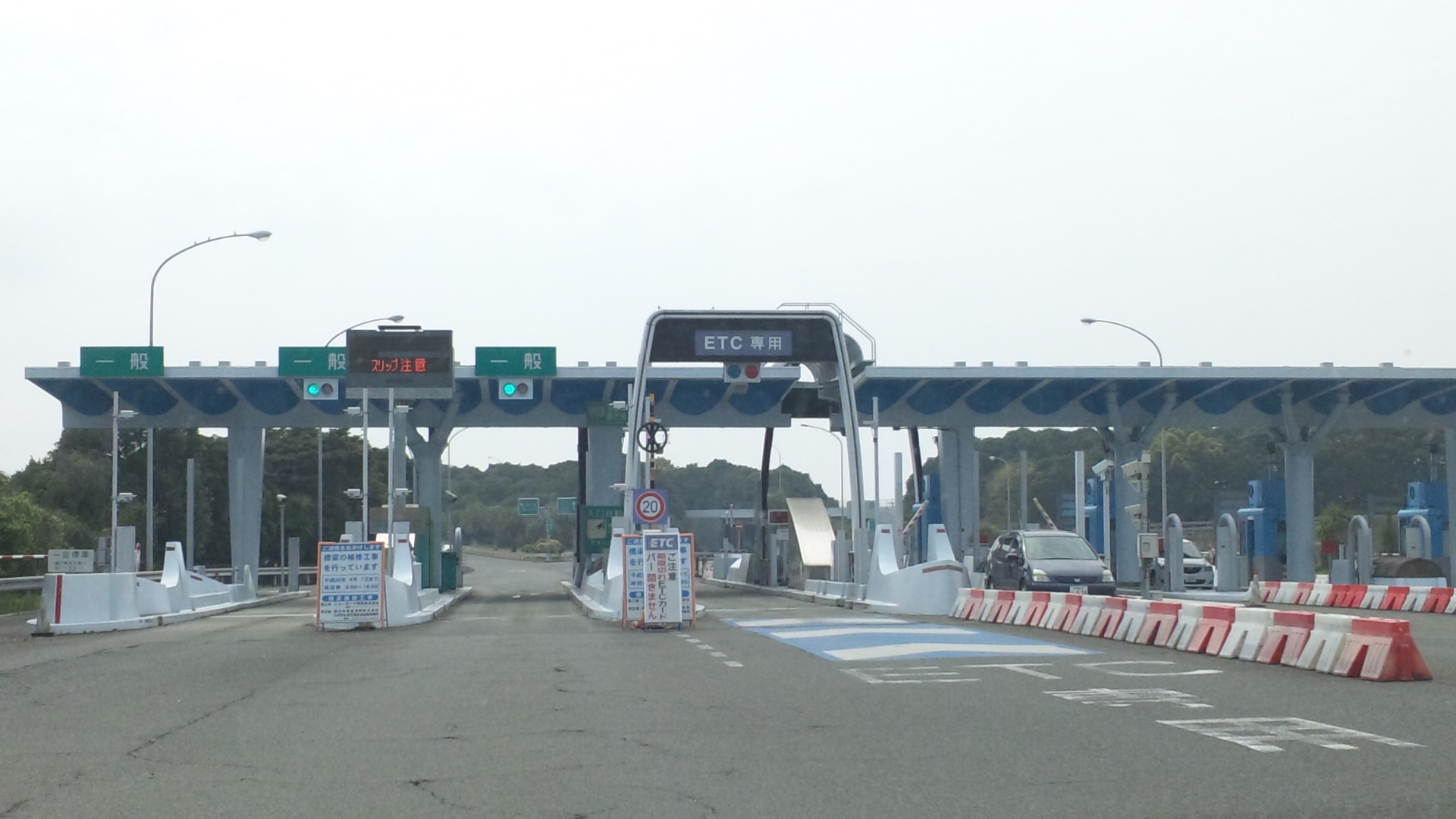 溝辺鹿児島空港ICの画像